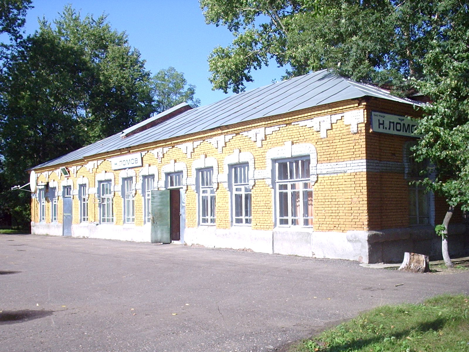 Вокзал станции Нижний Ломов. Вид со стороны путей.